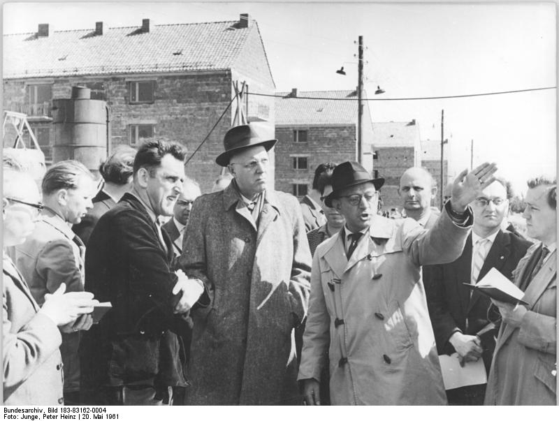 Zentralbild-Junge 20.5.1961 Aussprache Heinrich Homann mit Werktätigen in Wernigerode Die Werktätigen des Harzkreises Wernigerode begrüßten am 19.5.1961 den Stellvertreter des Vorsitzenden des Staatsrates Heinrich Homann zu einem zweitägigen Besuch in ihrer Kreisstadt. Im Mittelpunkt der Aussprachen und Beratungen, die am 20.5.1961 mit einer außerordentlichen Ratssitzung ihren Abschluß fanden, stehen die Vorschläge und Hinweise der Bevölkerung zu den verschiedenen Problemen des gesellschaftlichen und wirtschaftlichen Lebens. UBz: Heinrich Homann besuchte am gleichen Tag die Baustelle der AWG des VEB Elektromotrenwerk Wernigerode in der Harzstadt. Heinrich Homann (Mitte) im Gespräch mit Bauarbeitern.